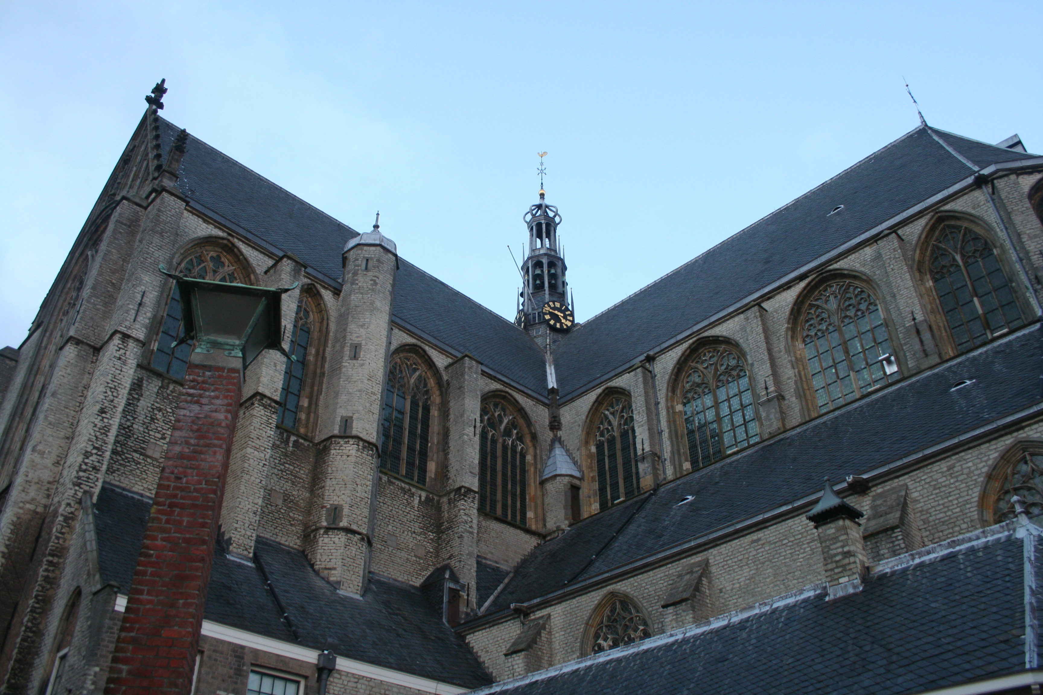 foto van de sint laurenskerk in Alkmaar, genomen door robert smit met de canon eos 350D